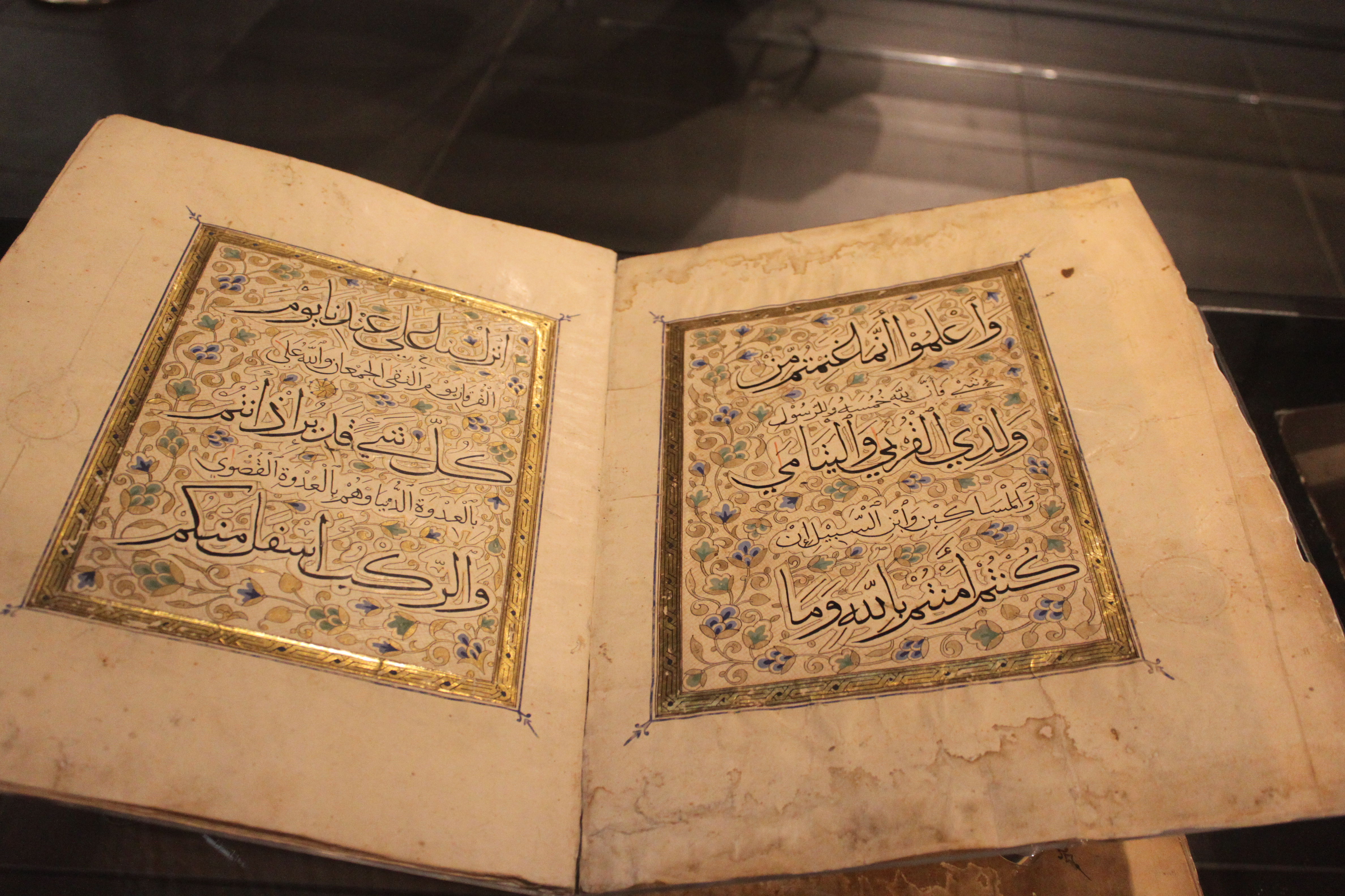 Double page d'ouverture - Coran d'Abd el-Kader - Le Caire - 14e siècle - Louvre - MAO 2281 - achevé le 10 dhu al-hijja 789 H/22 décembre 1387 Copié par Ahmad al--Isfahani dans la madrasa du sultan Abu Saʿid Barquq - Encre, pigments et or sur papier - Collection de l’émir Abd el-Kader, offert à Léon Roches Le manuscrit s’ouvre sur une page frontispice indiquant le numéro de volume, suivie de la double-page d’ouverture enluminée(sourate 8, versets 41-42), à décor de rinceaux ponctués de boutons de lotus. Le style du décor est assez inhabituel et peut-être attribué au copiste d’origine iranienne Ahmad al-Isfahani